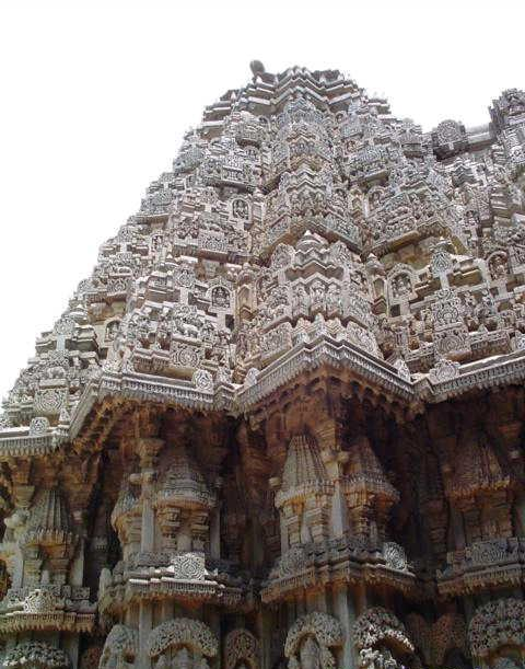 Hoysala temple Somanathapura, Karnataka state, India